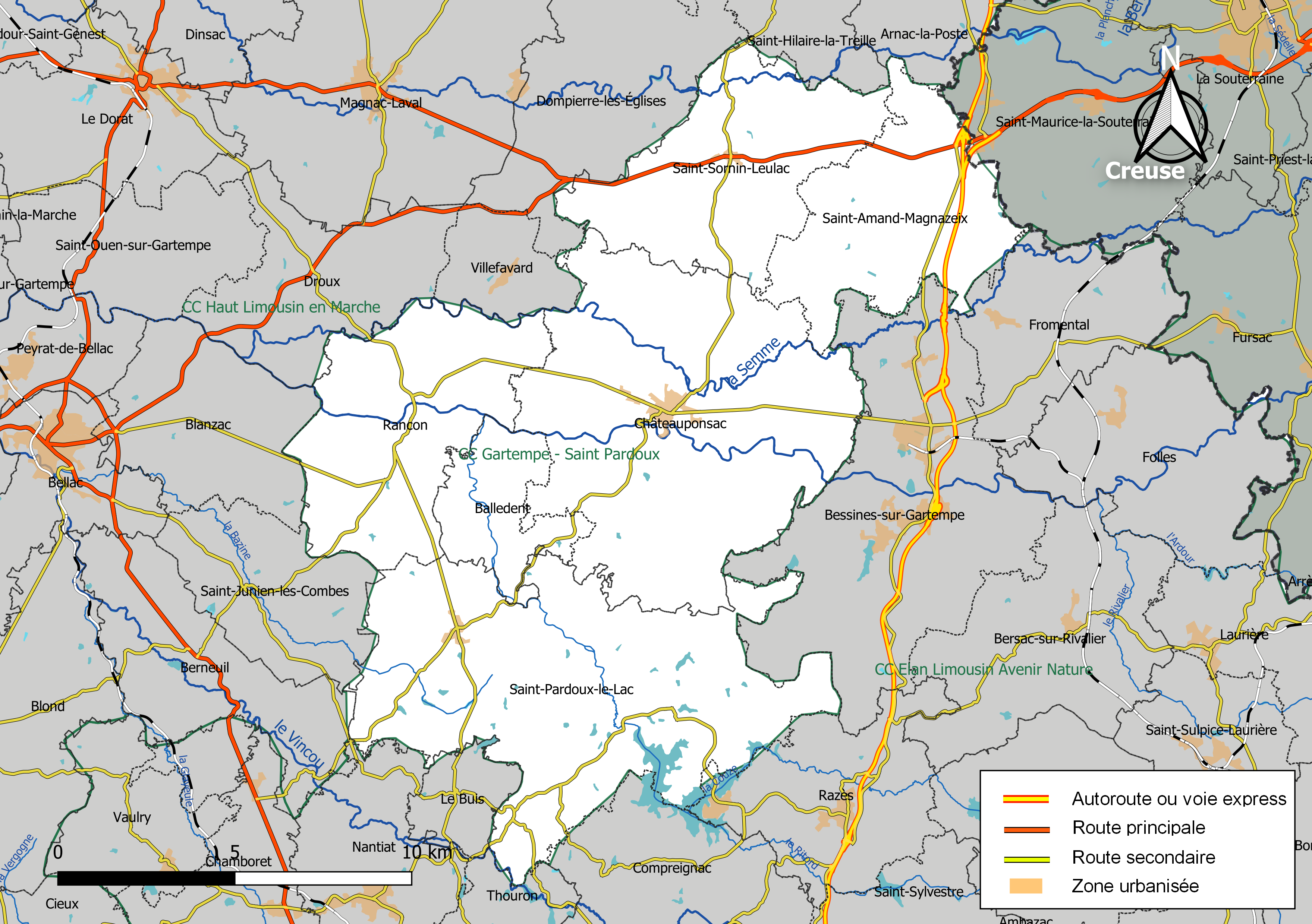 Carte géographique de la Communauté de communes Gartempe - Saint-Pardoux, département de la Haute-Vienne, France. Composition au 1er janvier 2019.